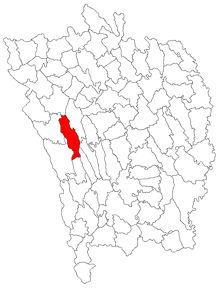 Categorie:Hărţi ale judeţului Vaslui